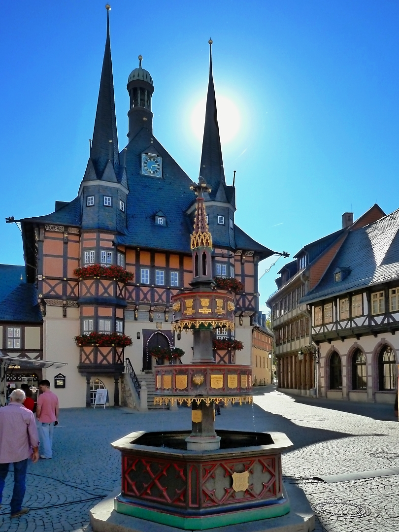 Historischer Markt mit Rathaus in Wernigerode